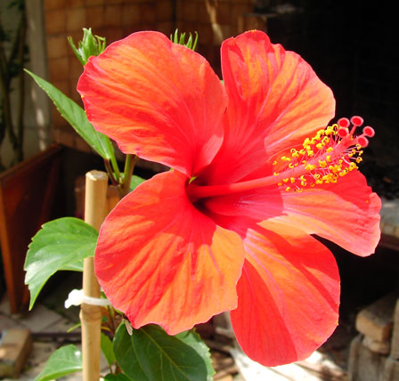 Auteur: Richard Digonal Fleur d'hibiscus Rosa-Sinensis importé d'Ouzbekistan.